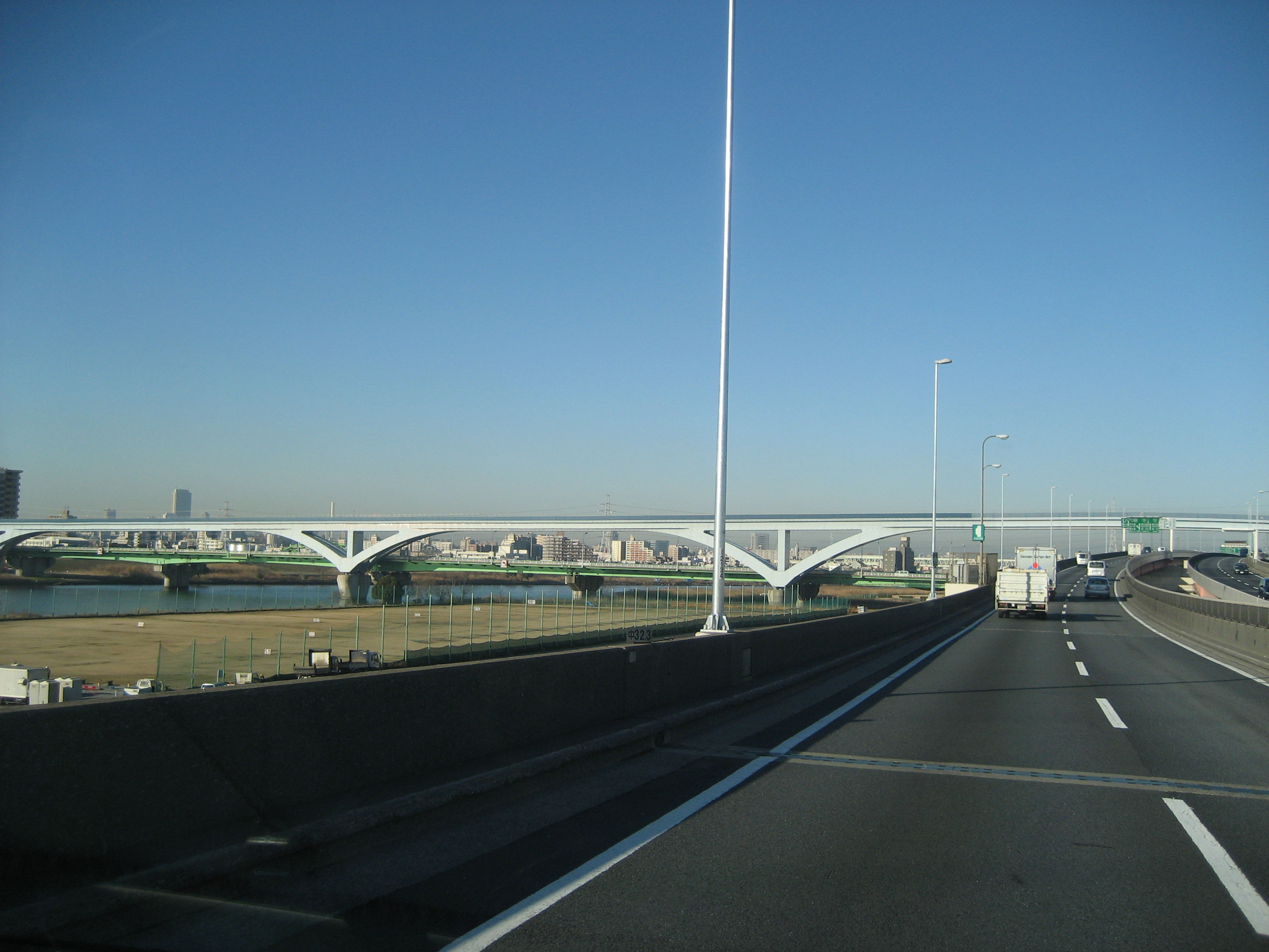 中央環状線と日暮里舎人ライナーとの交差部分付近